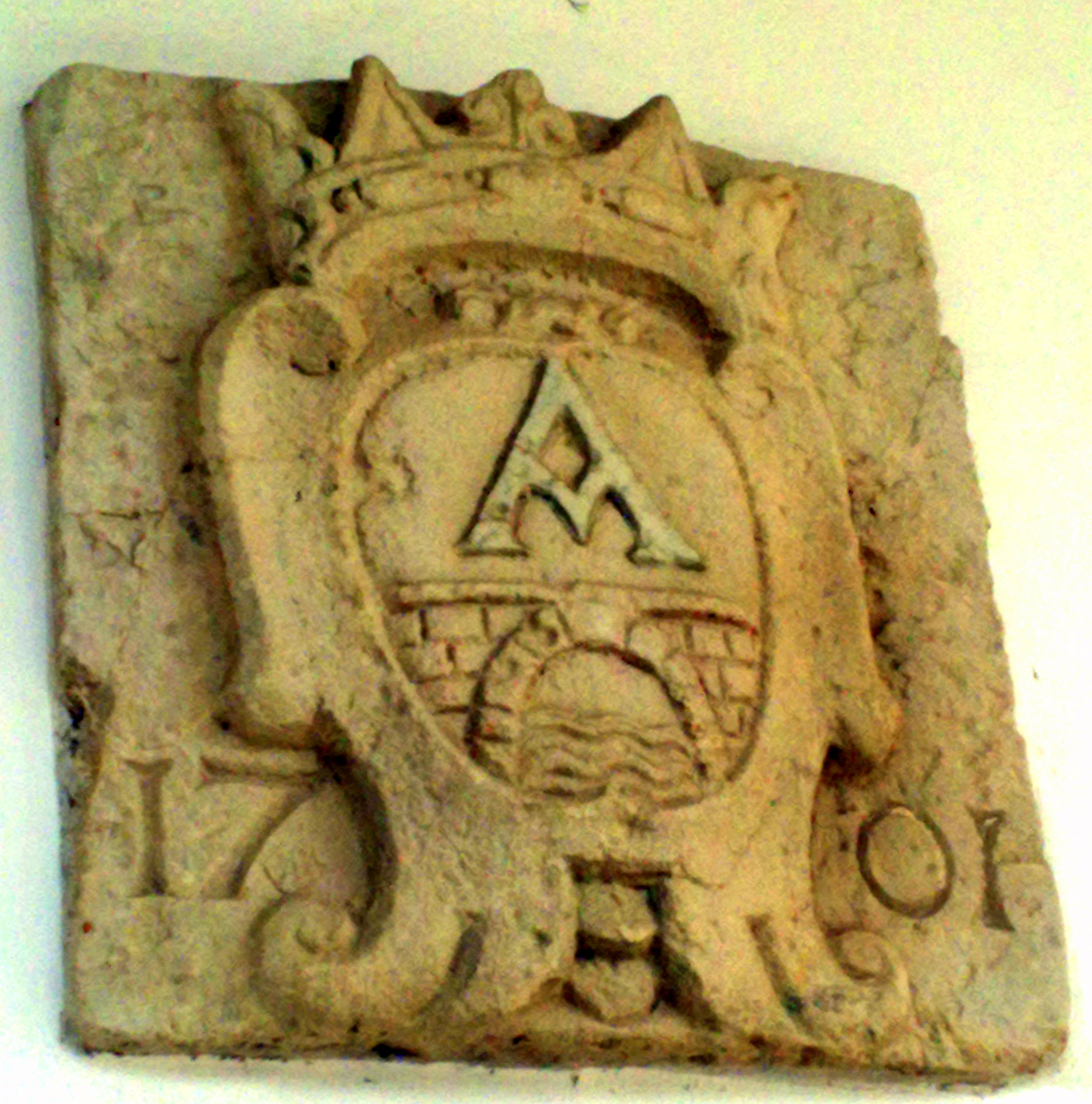 Stemma di Accadia (FG) sulla Fontana Monumentale